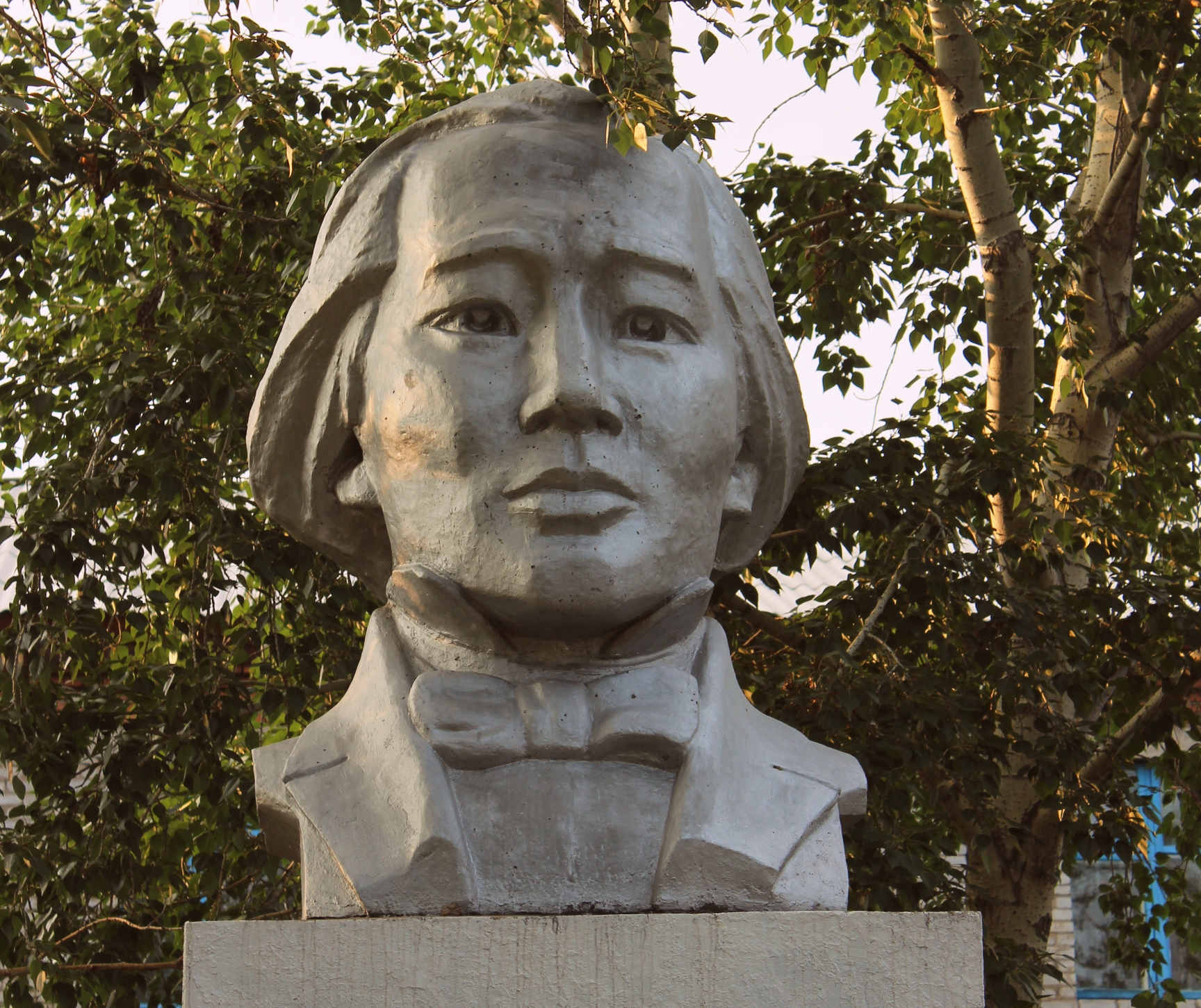 Памятник Доржи Банзарову перед фасадом школы в селе Дэдэ-Ичётуй, Джидинский район, Бурятия